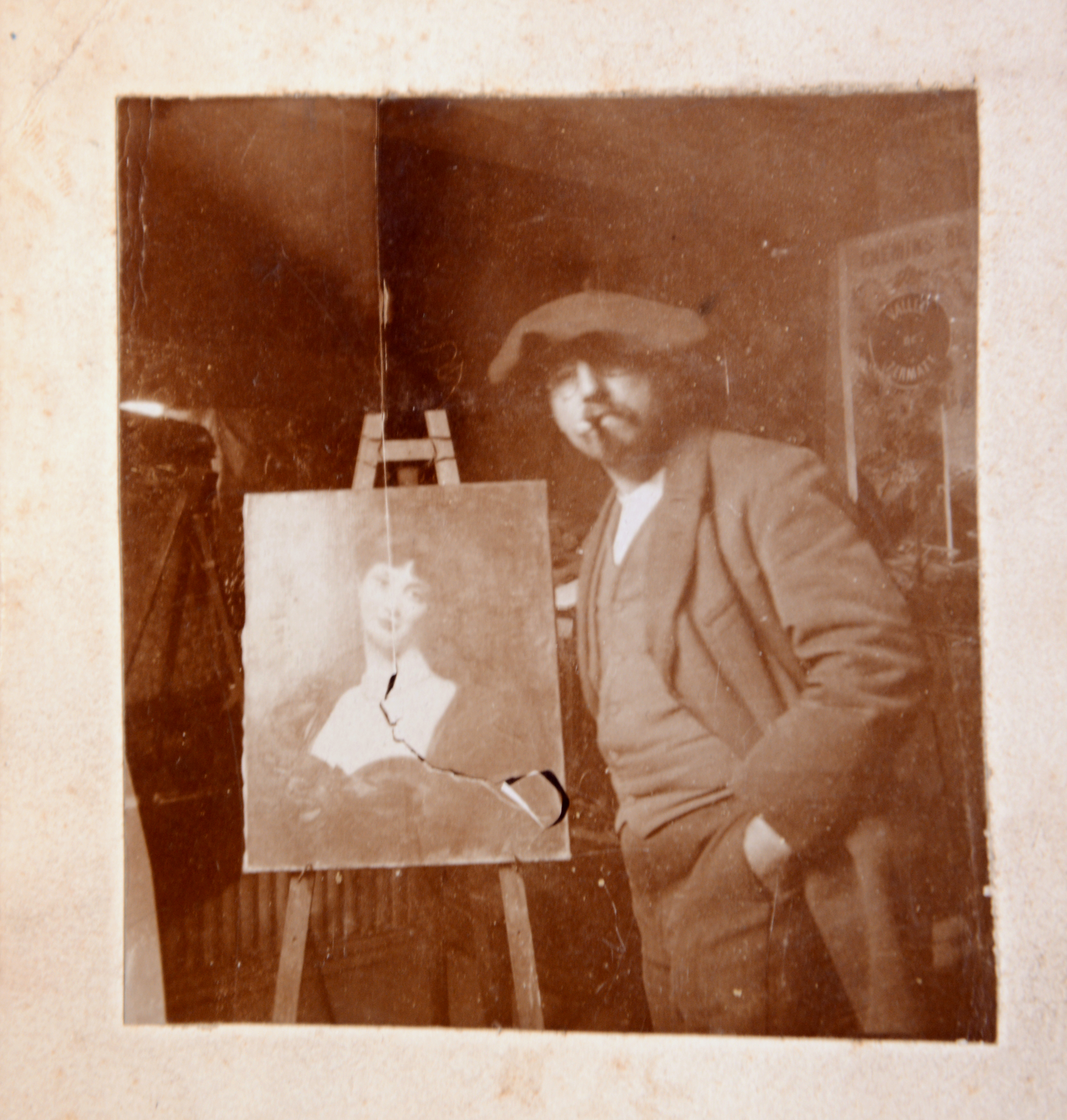 De Guido Oppenheim a jonke Joeren.